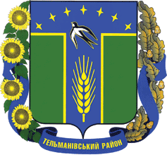 Герб_Тельмановського_району